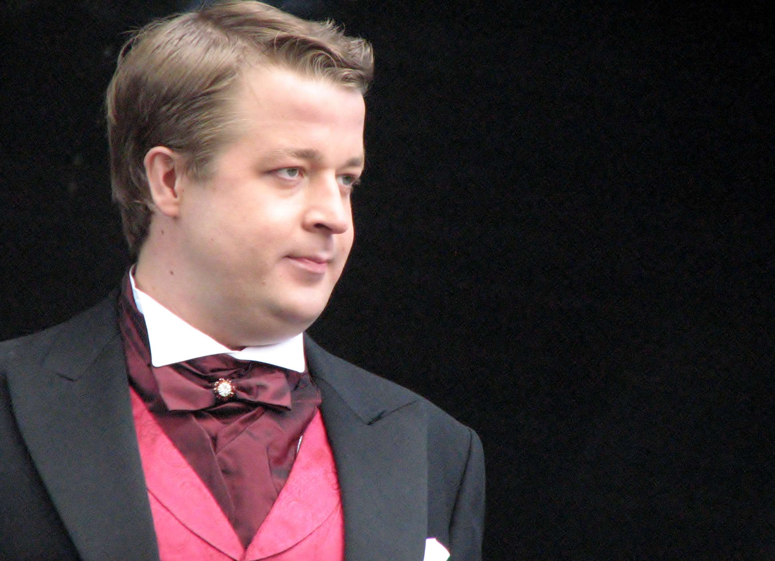 Oliver Kuusik esinemas Rahvusooper Estonia 107. hooaja avamisel